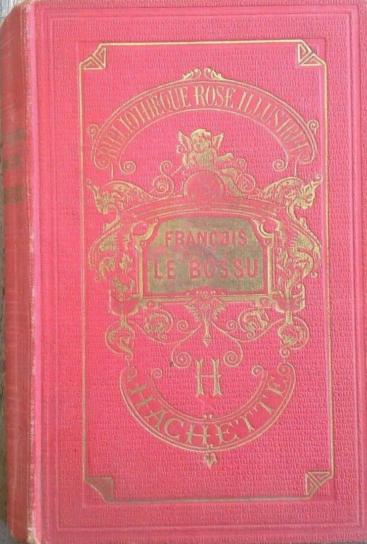 Comtesse de Ségur, François le bossu (1864) , Bibliothèque rose, Hachette, édition 1872.